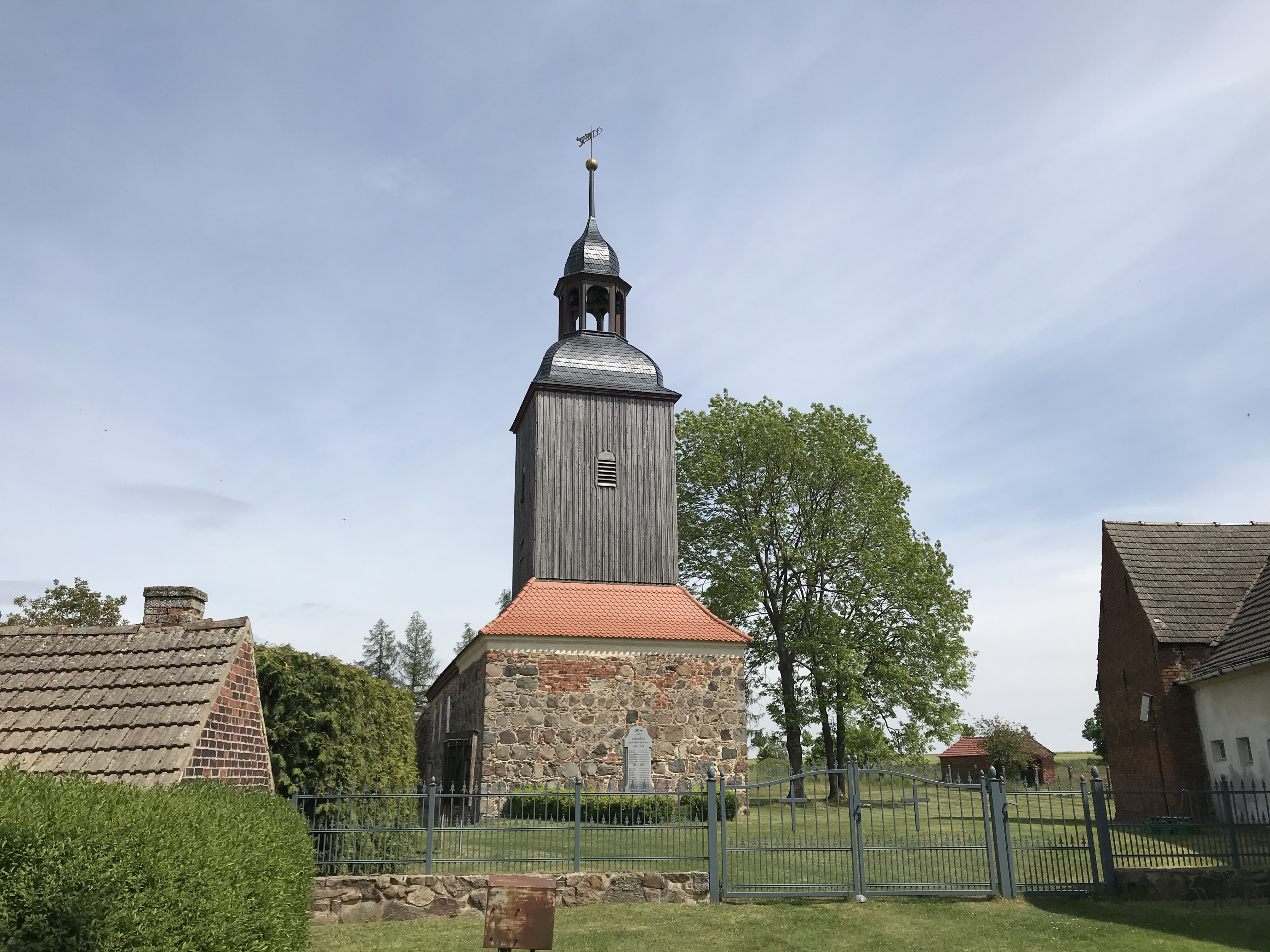 Die evangelische Dorfkirche Riesdorf ist eine Feldsteinkirche in Riesdorf, einem Ortsteil der Gemeinde Niederer Fläming im Landkreis Teltow-Fläming im Land Brandenburg